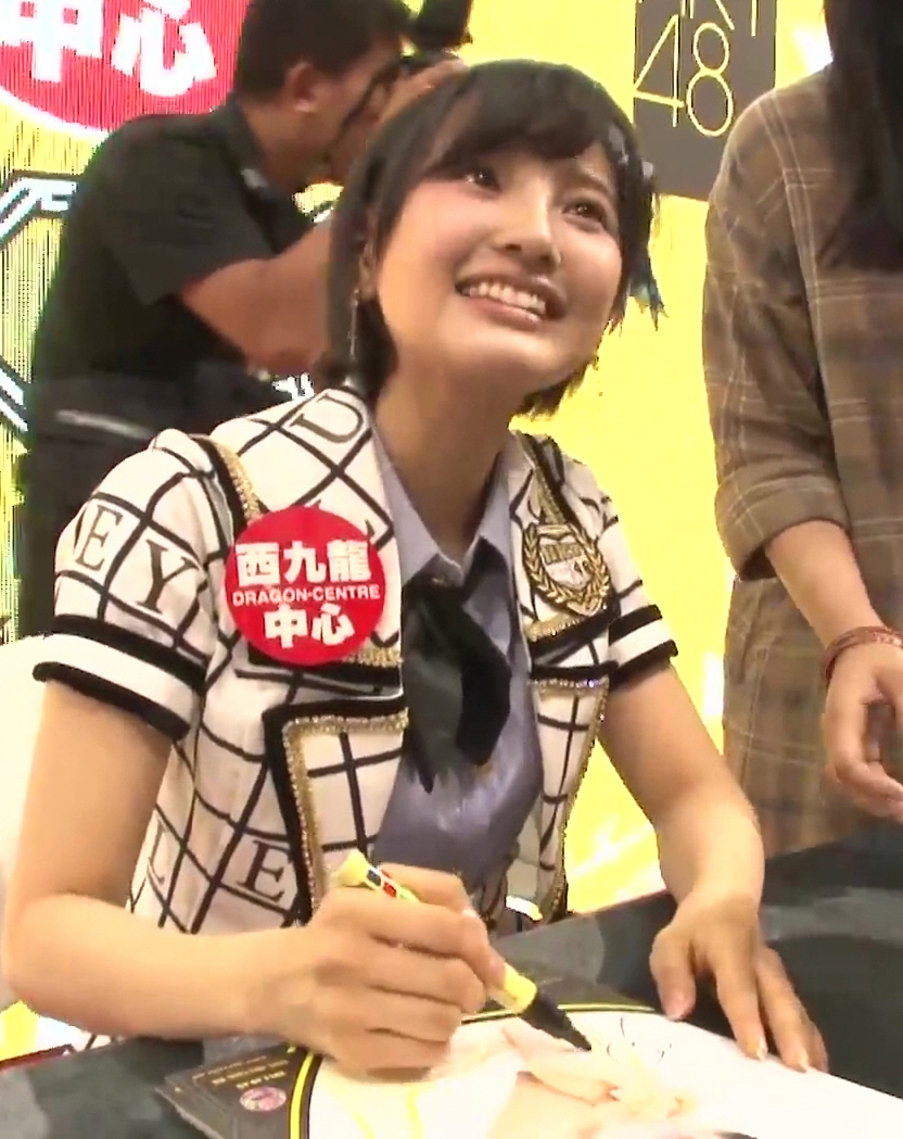 中文（香港）: HKT48握手簽名會 @ 西九龍中心